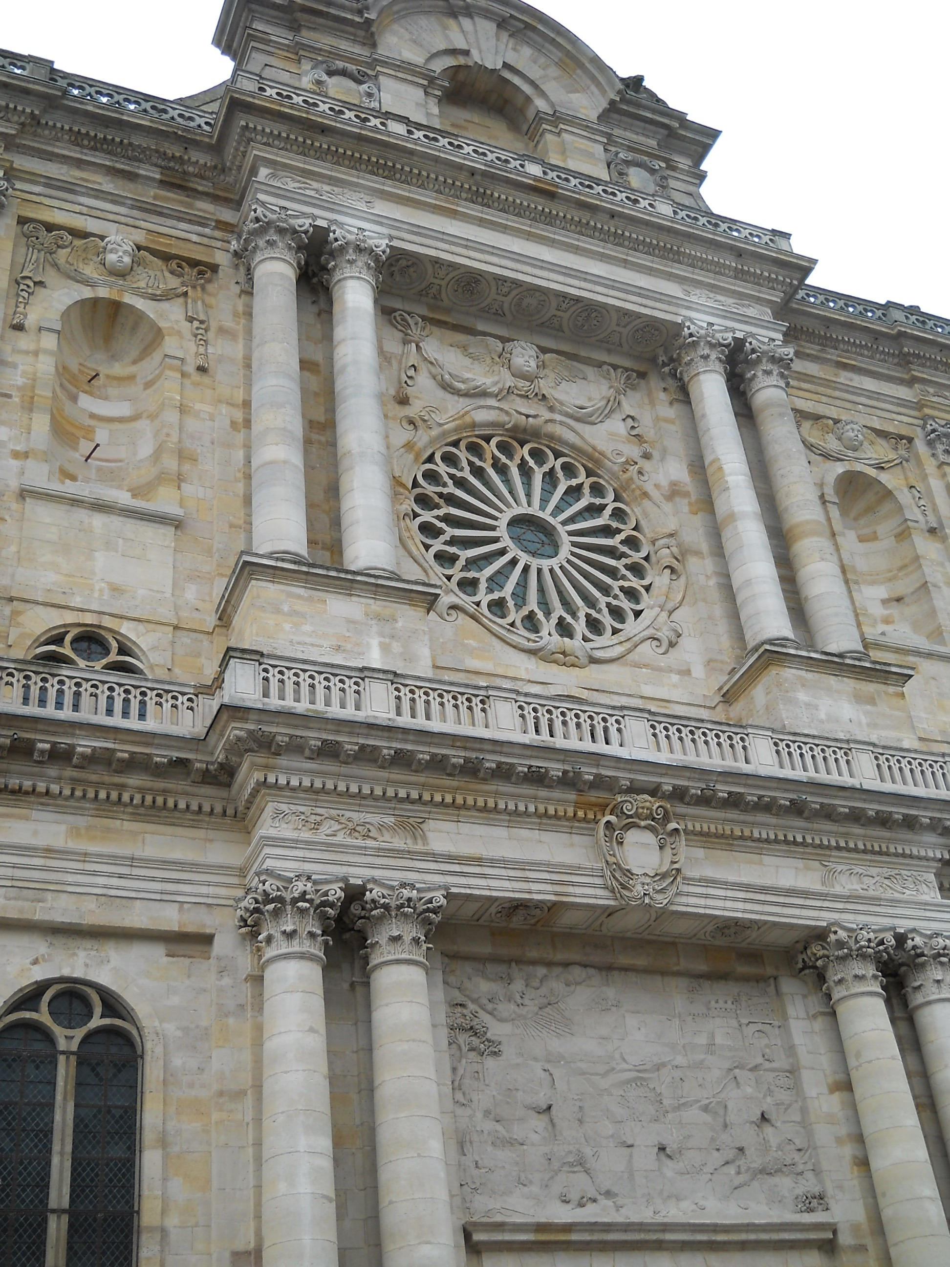 Châlons-en-Champagne, Kathedrale St-Etienne, frühklassizistische Westfassade